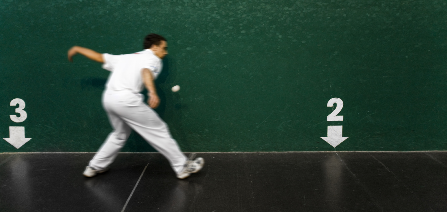 Esku pilota Pelotari golpeando la pelota